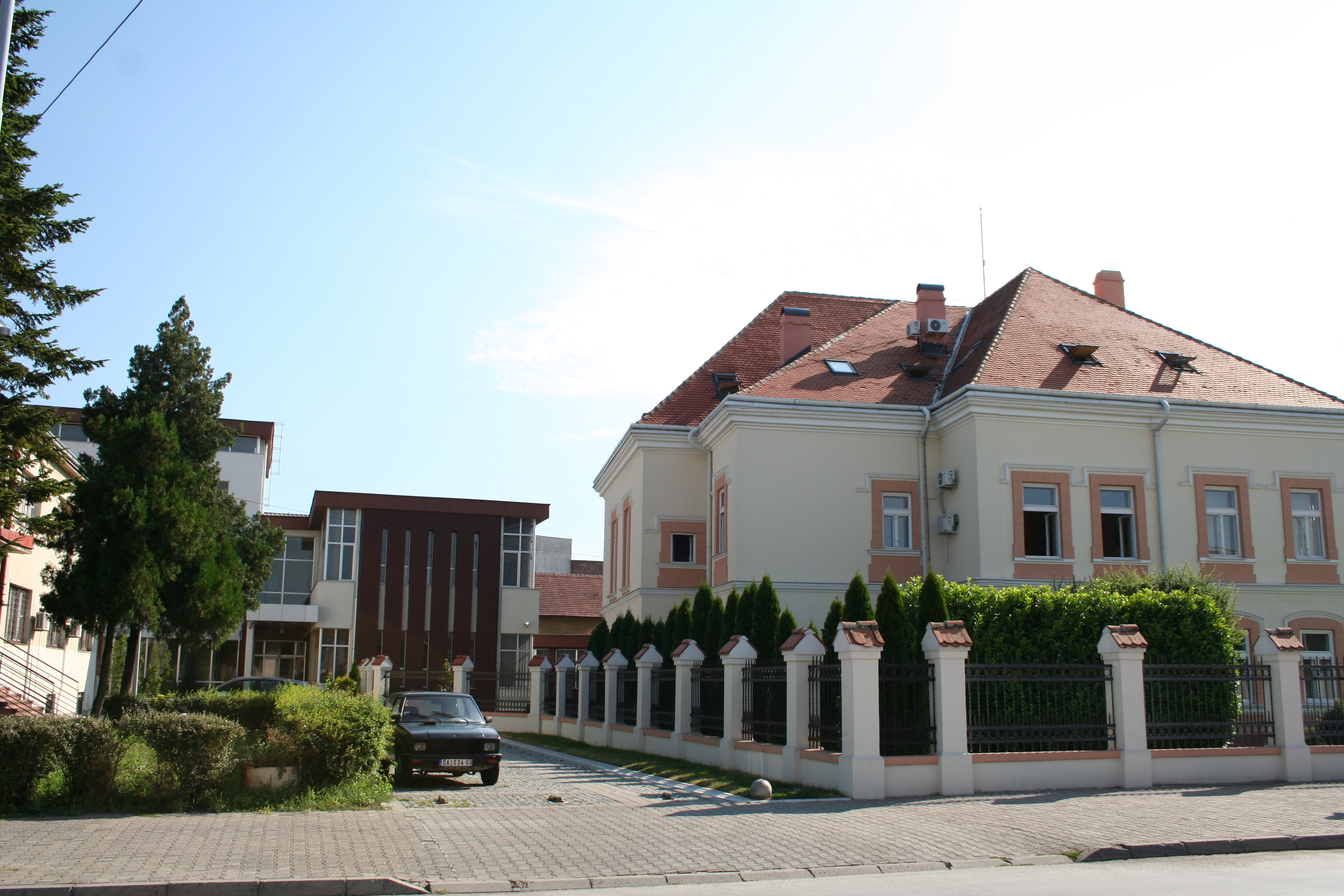 Narodna biblioteka-depadans, Šabac